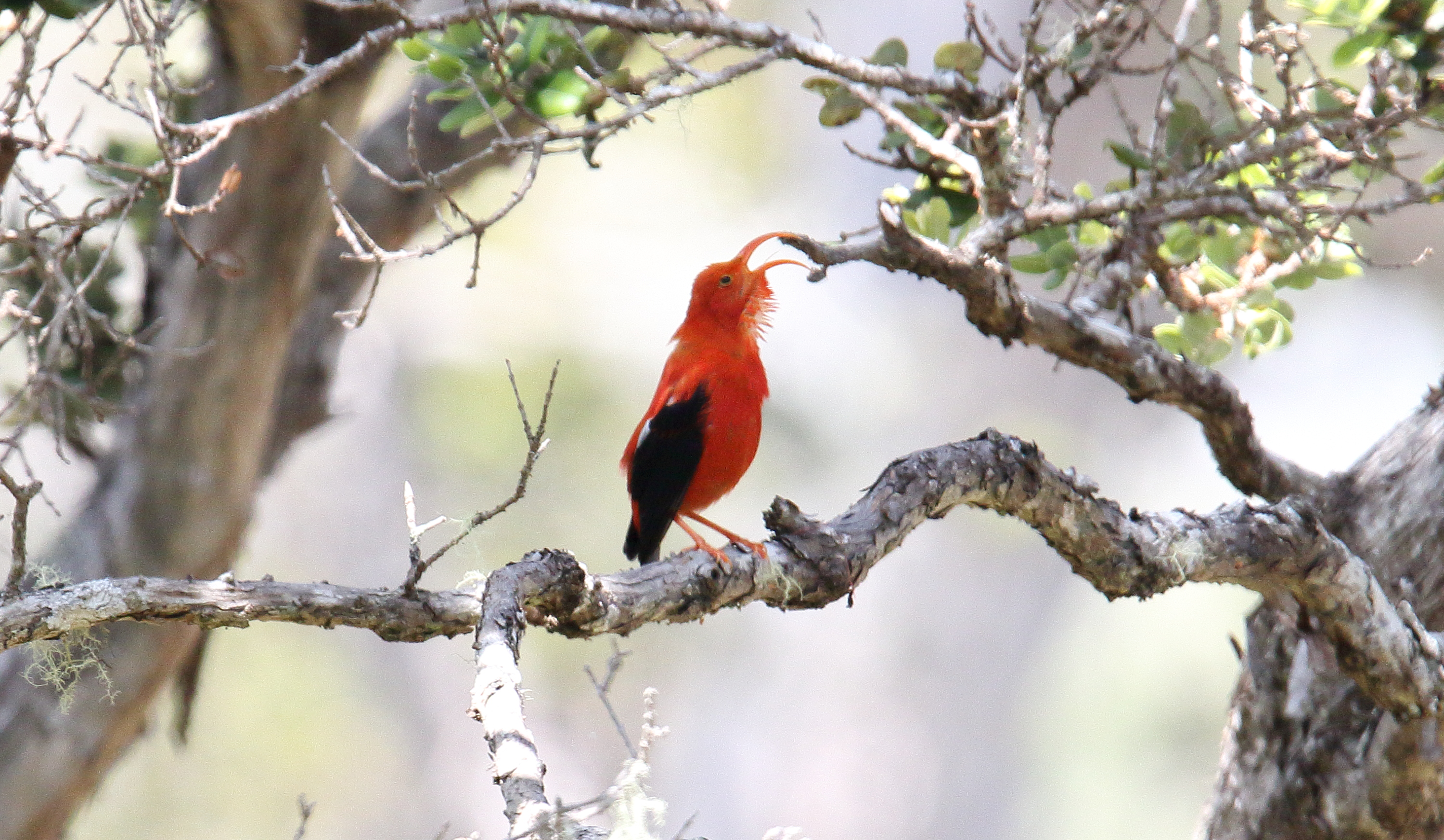 Iiwi (Vestiaria coccinea)